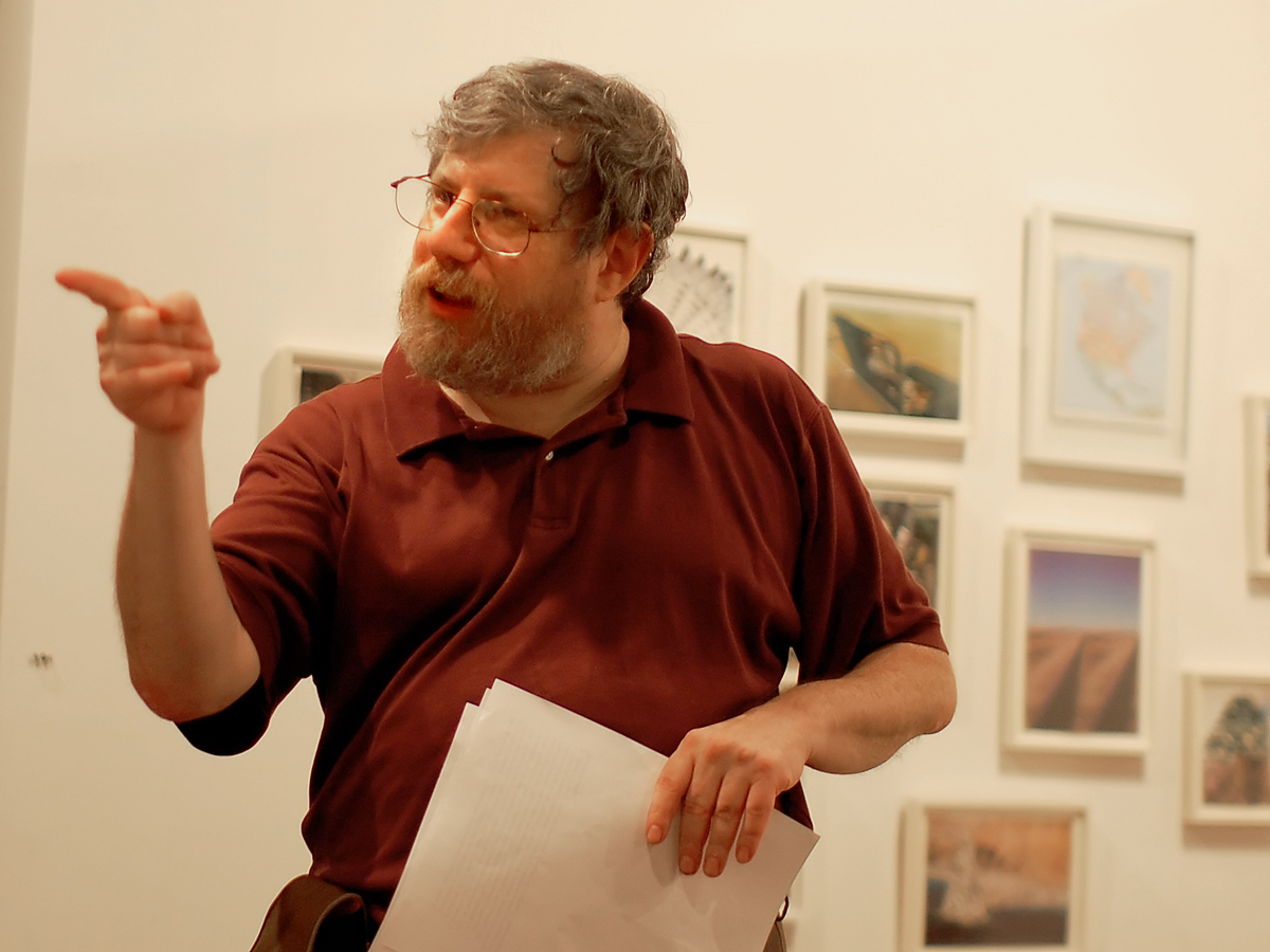 Jim Freund